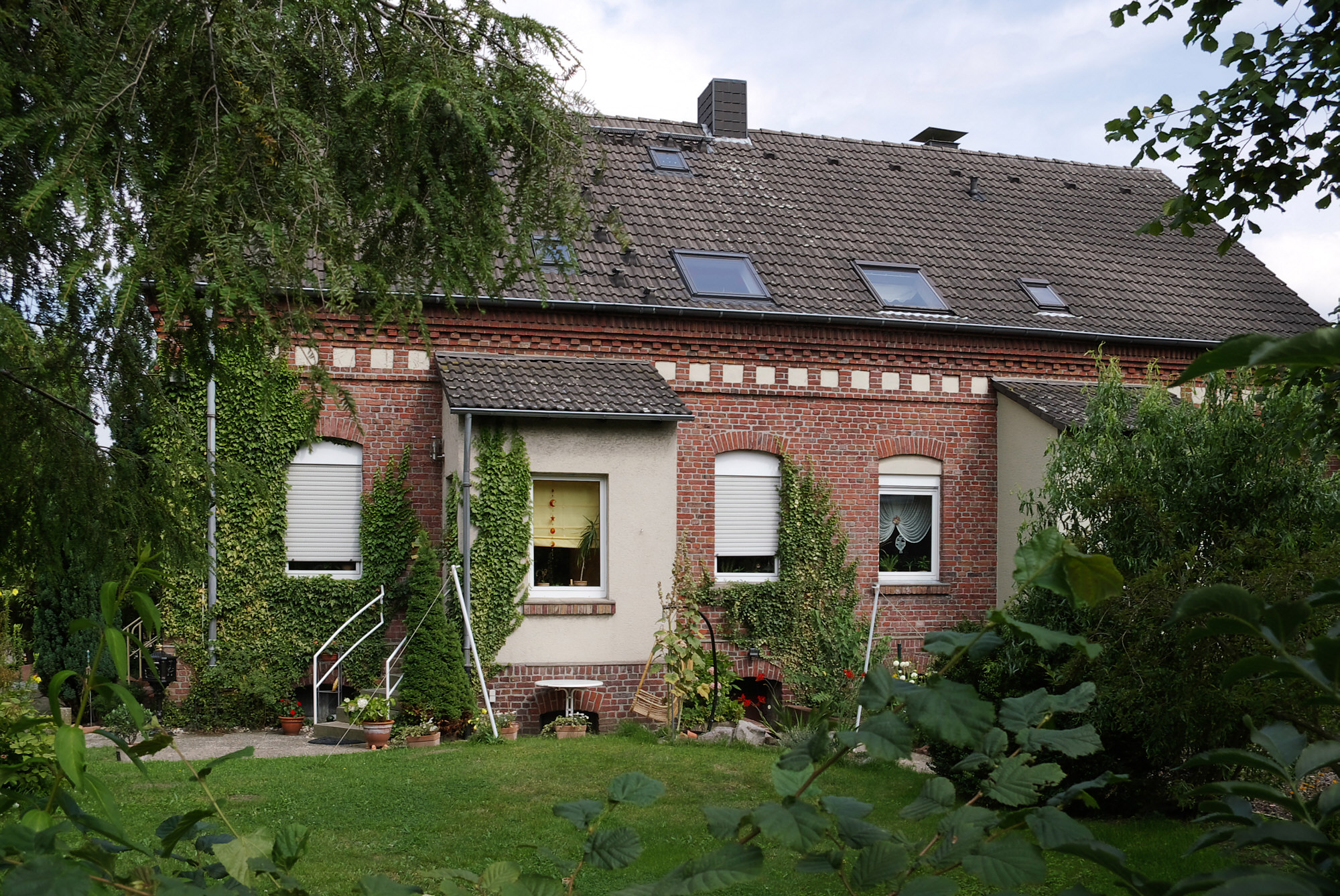 Bergarbeitersiedlung in Bergkamen-Rünthe, sog. D-Zug-Siedlung